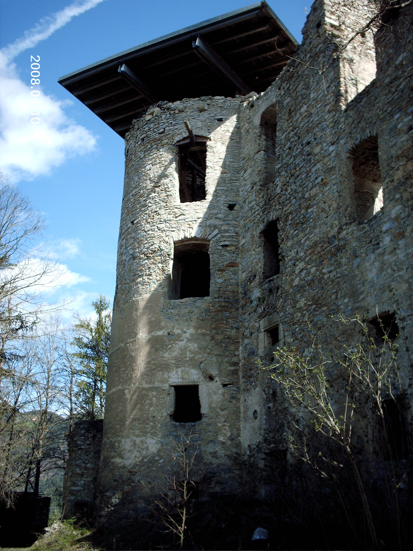 Burgruine Waisenberg Bergfried